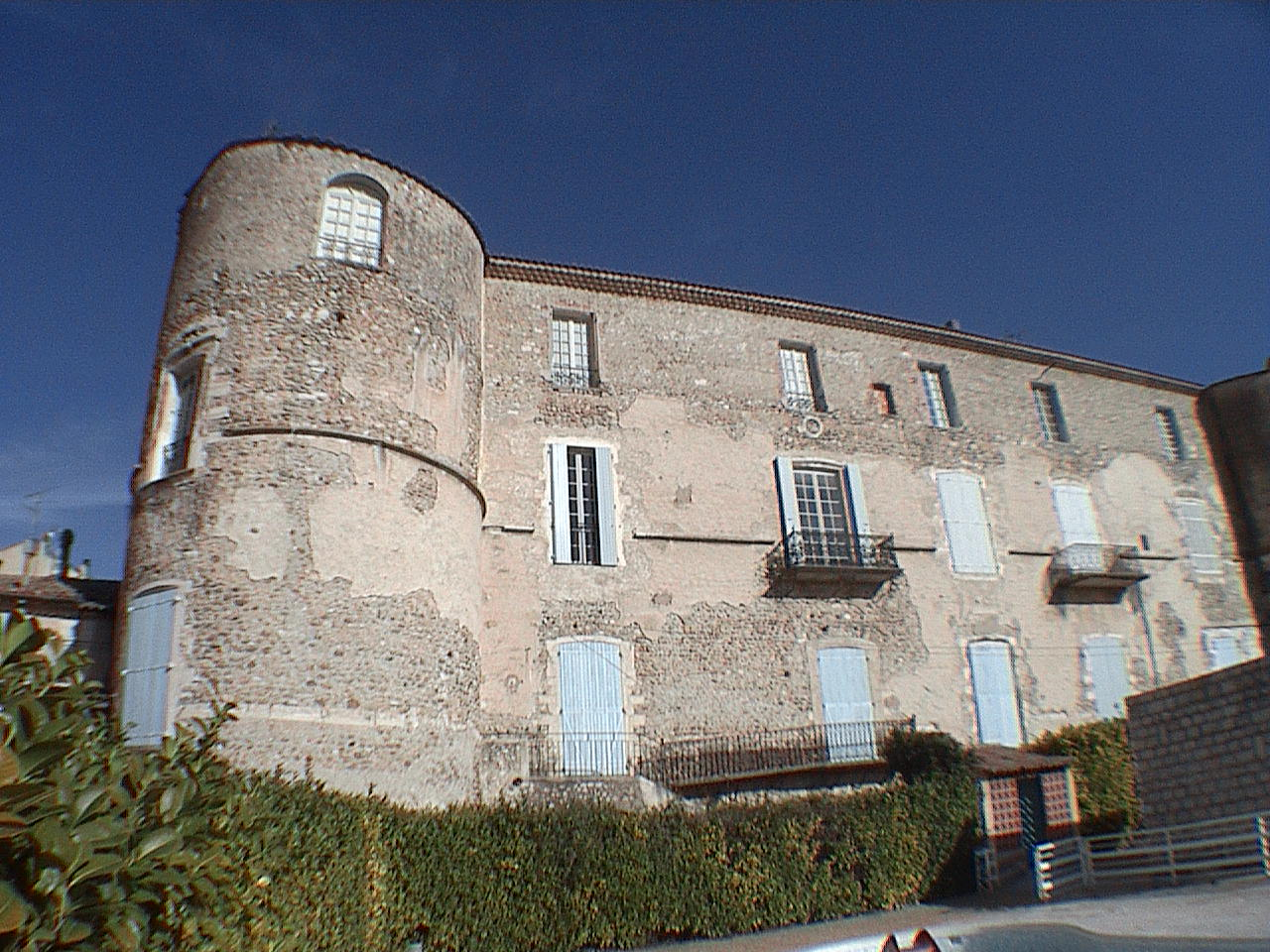 Le château d'Oraison (Alpes-de-Haute-Provence)